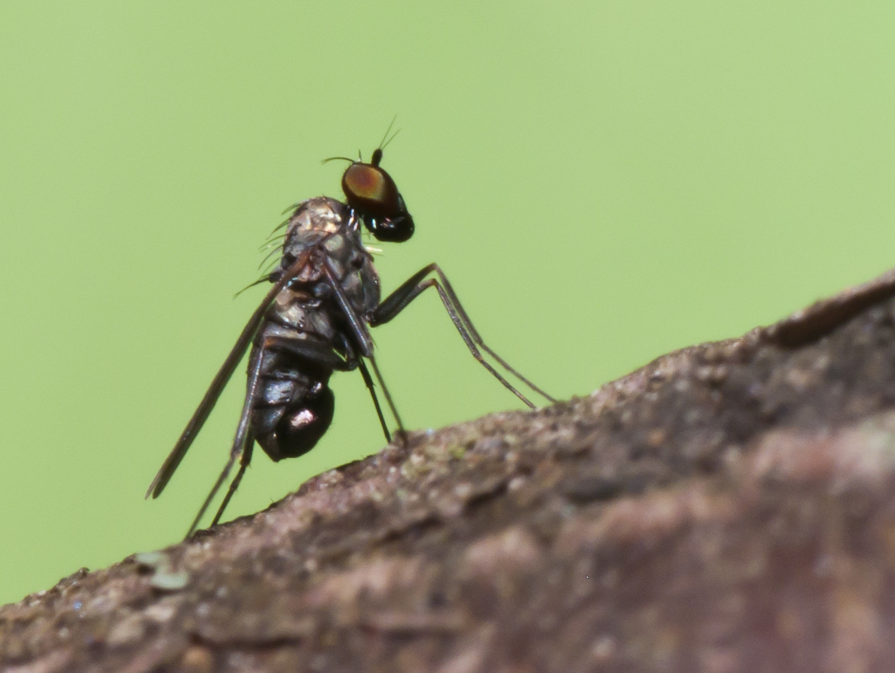 Medetera sp., Dolichopodidae, Brión, Galicia (Spain)